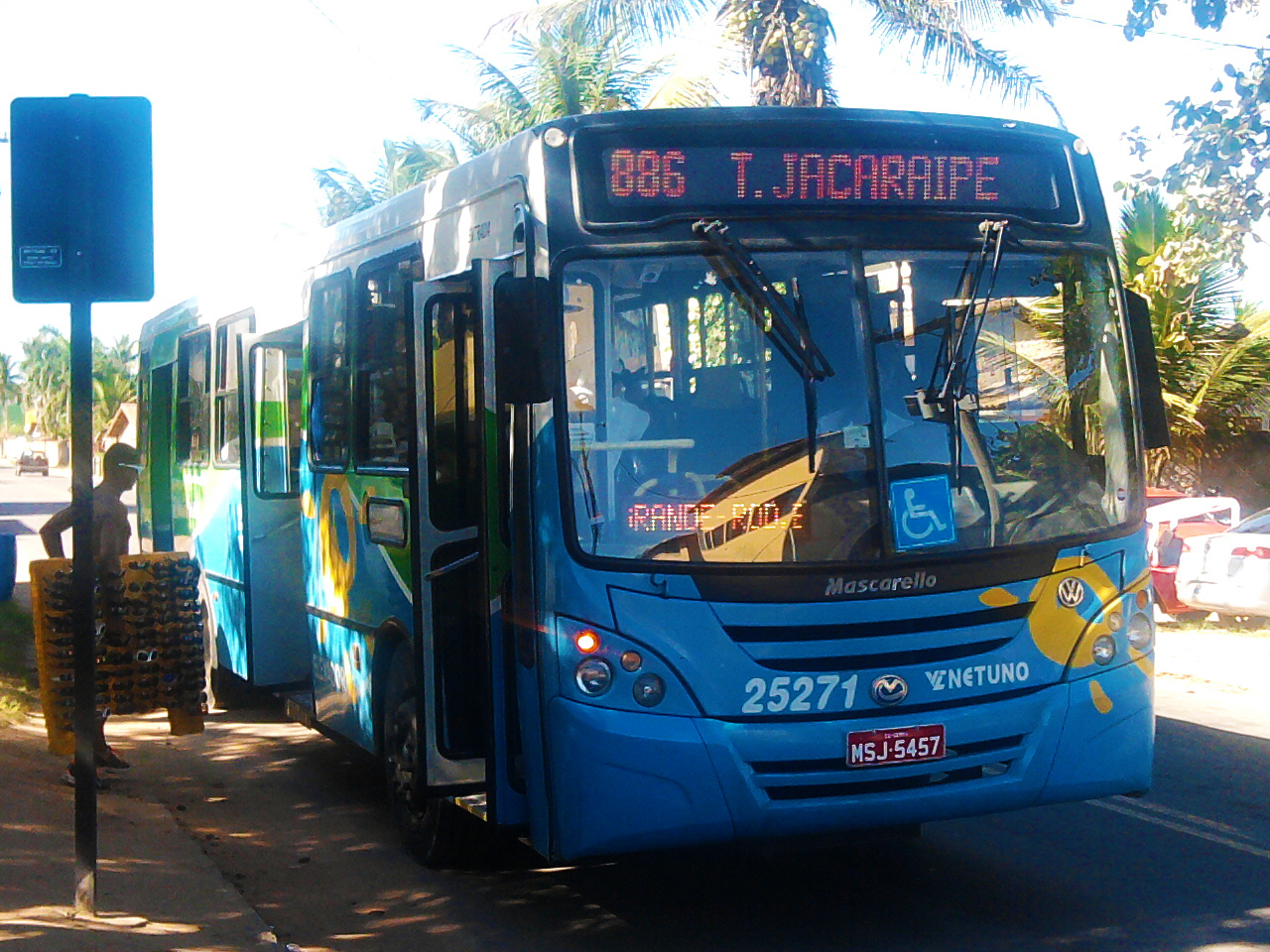 Ônibus do Transcol (transporte coletivo da Grande Vitória), da linha 886 (Direção - Terminal de Jacaraípe) na rodovia ES-010, sentido Jacaraípe.